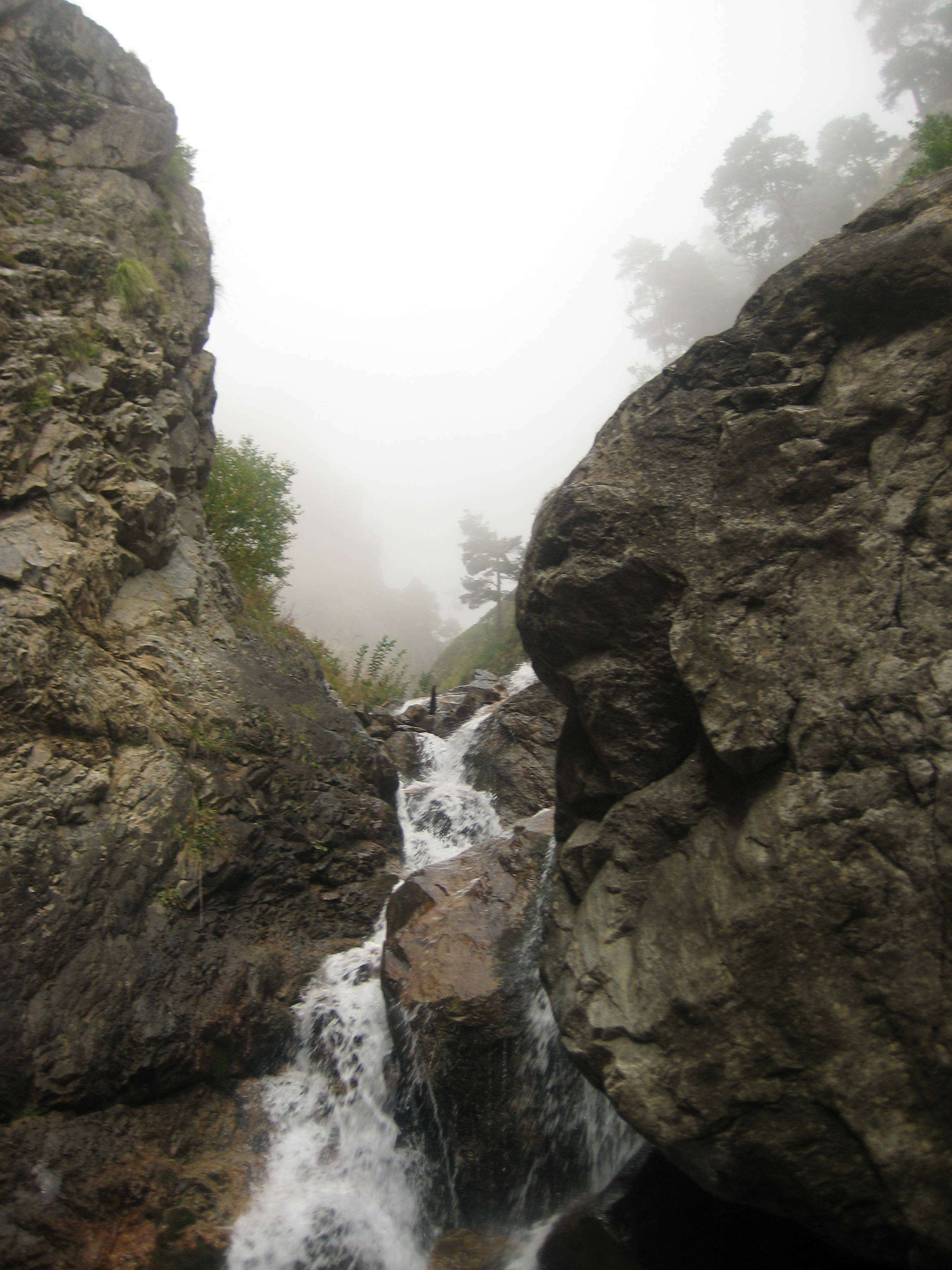 Северо-Осетинский заповедник, Алагирский район This image is related to the protected area of Russia number 1500105